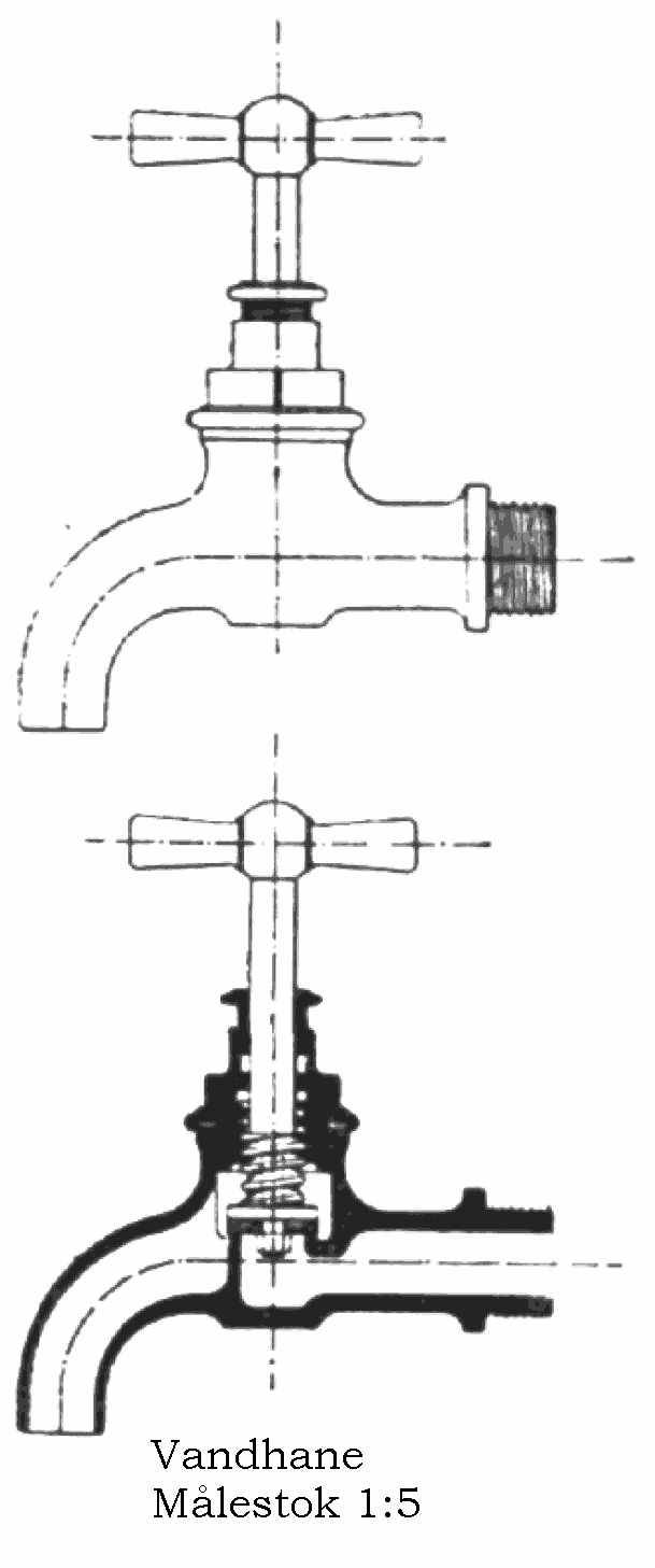 Vandhane - et eksempel på en ventil